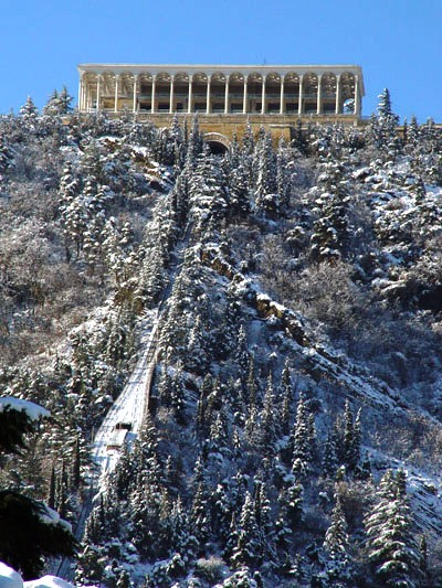 Standseilbahn Tiflis